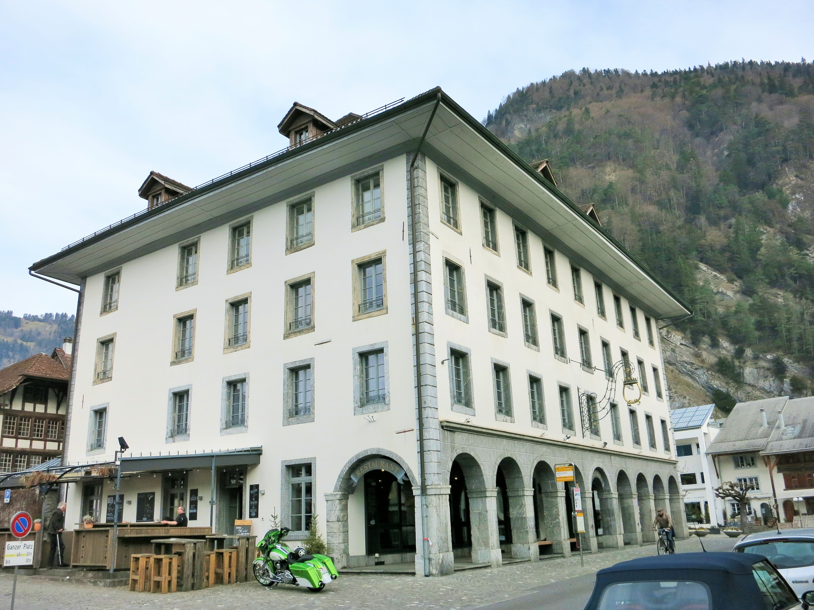 Altstadt, Unterseen BE, Schweiz